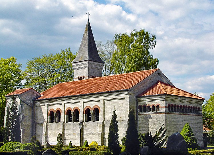 fra sydøst